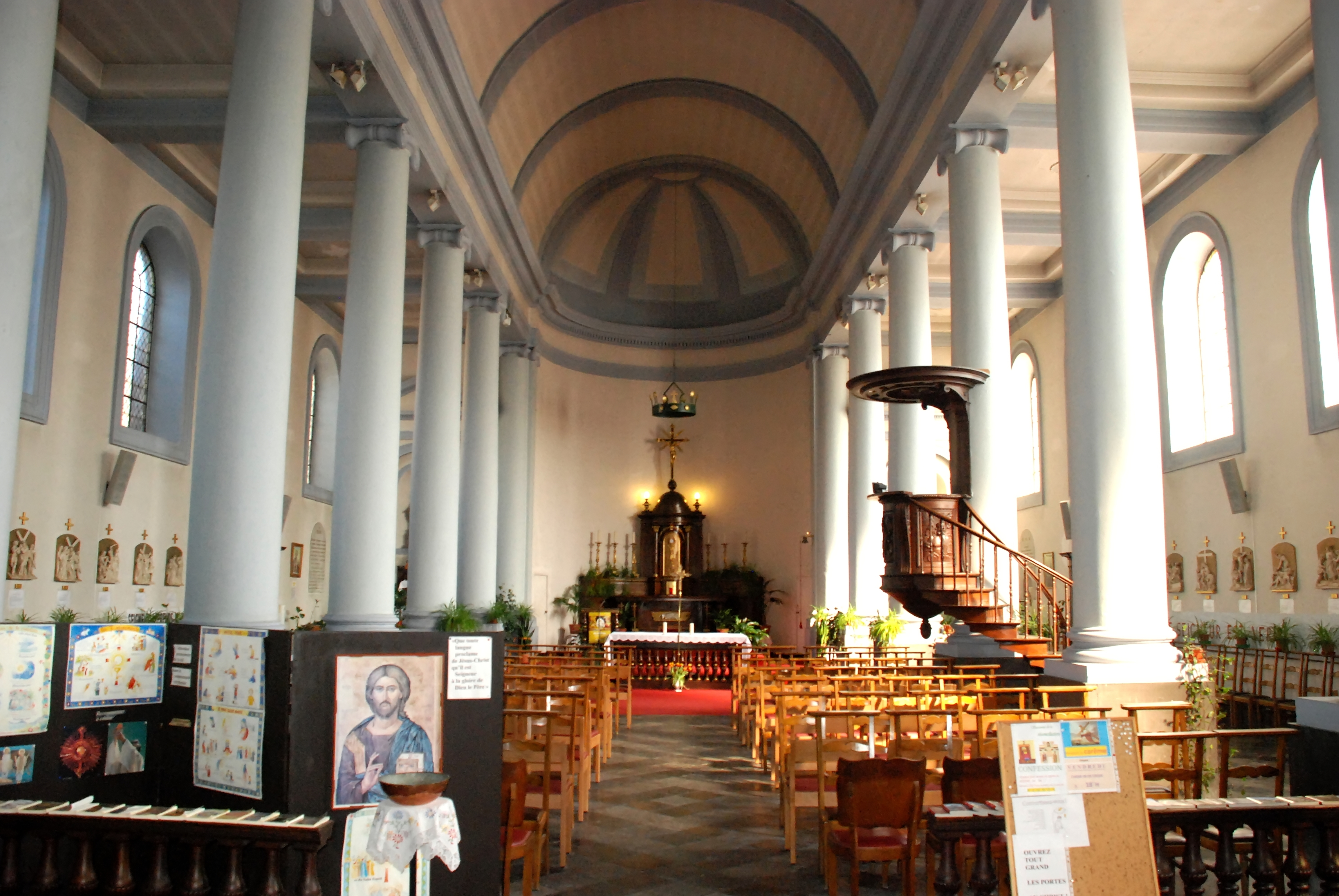 Belgique - Brabant wallon - Église Saint-Jean l'Évangéliste de Genappe